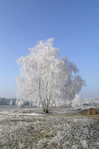 Winterstimmung Westruper Heide, Haltern